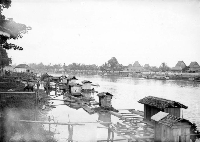 Negatief. Steden met meer dan 100.000 inwoners waren er op Borneo tot ver in de 20e eeuw niet te vinden. In 1930 waren er zelfs maar drie plaatsen met meer dan 20.000 inwoners: Bandjermasin, Pontianak en Balikpapan. Bandjermasin was met ruim 65.000 inwoners de grootste stad van 'Nederlands' Borneo. Het was ook een redelijk oude stad, hoofdstad en haven van het gelijknamige sultanaat. Dat was in de 17e en 18e eeuw redelijk welvarend geweest door handel in peper en bosproducten. Net als Palembang was Bandjermasin een echte waterstad, waar de meeste (houten) huizen op palen stonden of uit vlotten met opbouw (rakit) bestonden. (P. Boomgaard, 2001). Riviergezicht te Bandjermasin, Zuidoost-Borneo